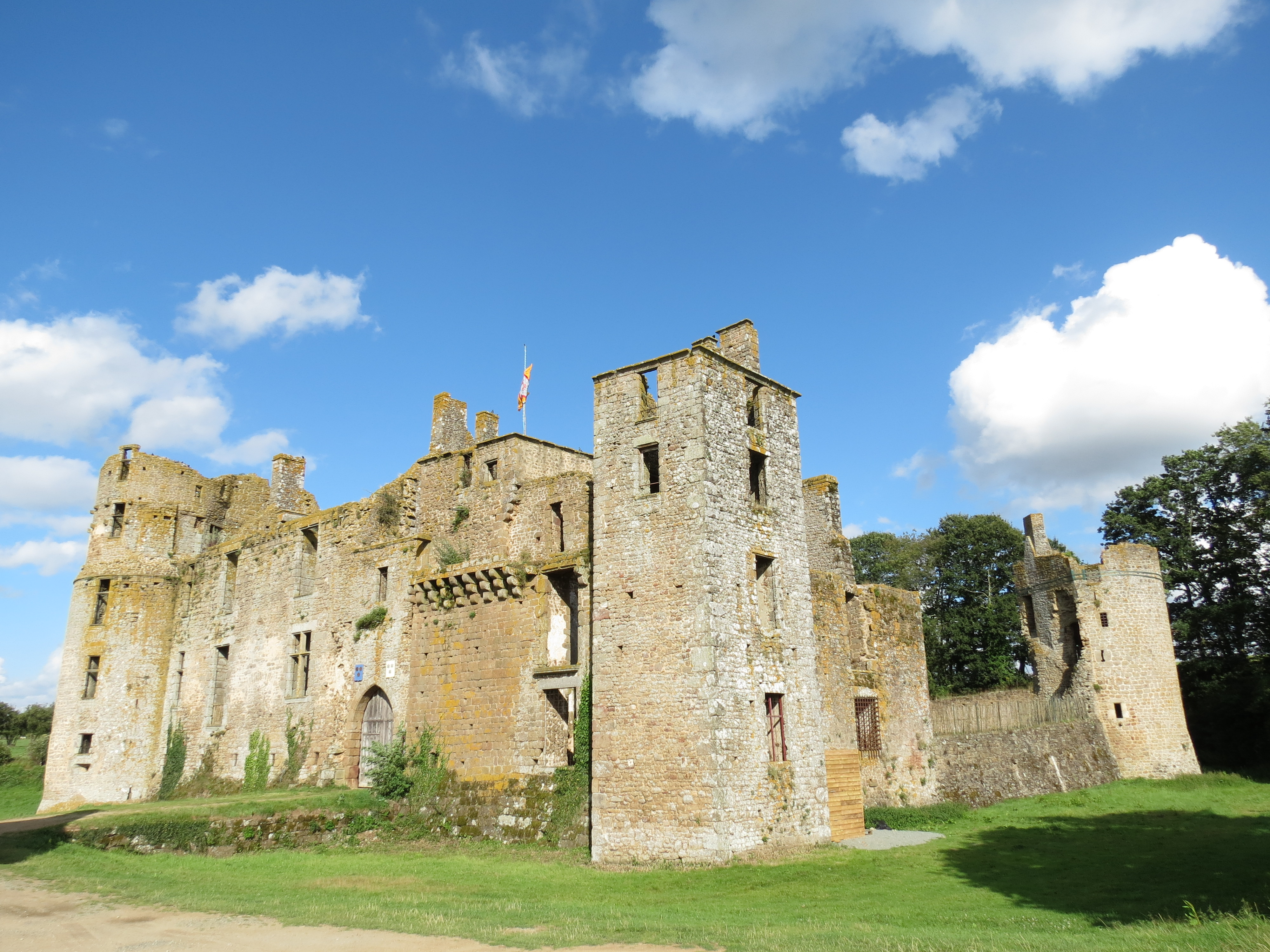 . Château du Bois-Thibault à Lassay-les-Châteaux, en Mayenne